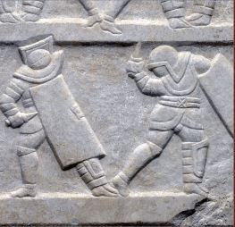 Ausschnitt aus dem Yale-Relief